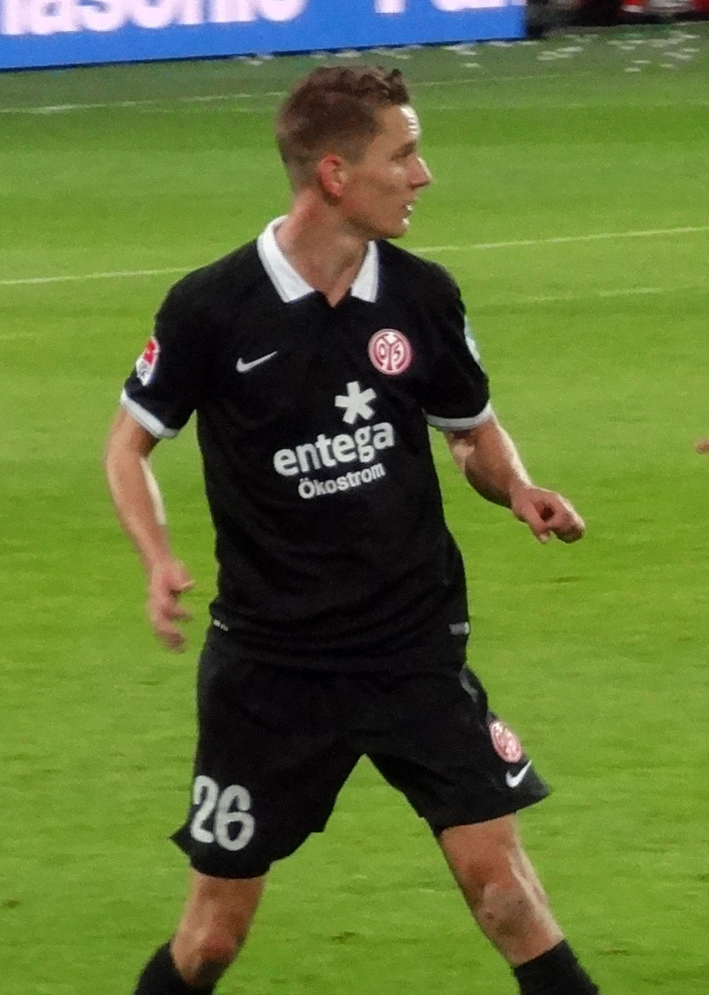 VfL Wolfsburg - Mainz 05 3:0 26.10.2014, Volkswagen Arena Deutsche Bundesliga - De Bruyne